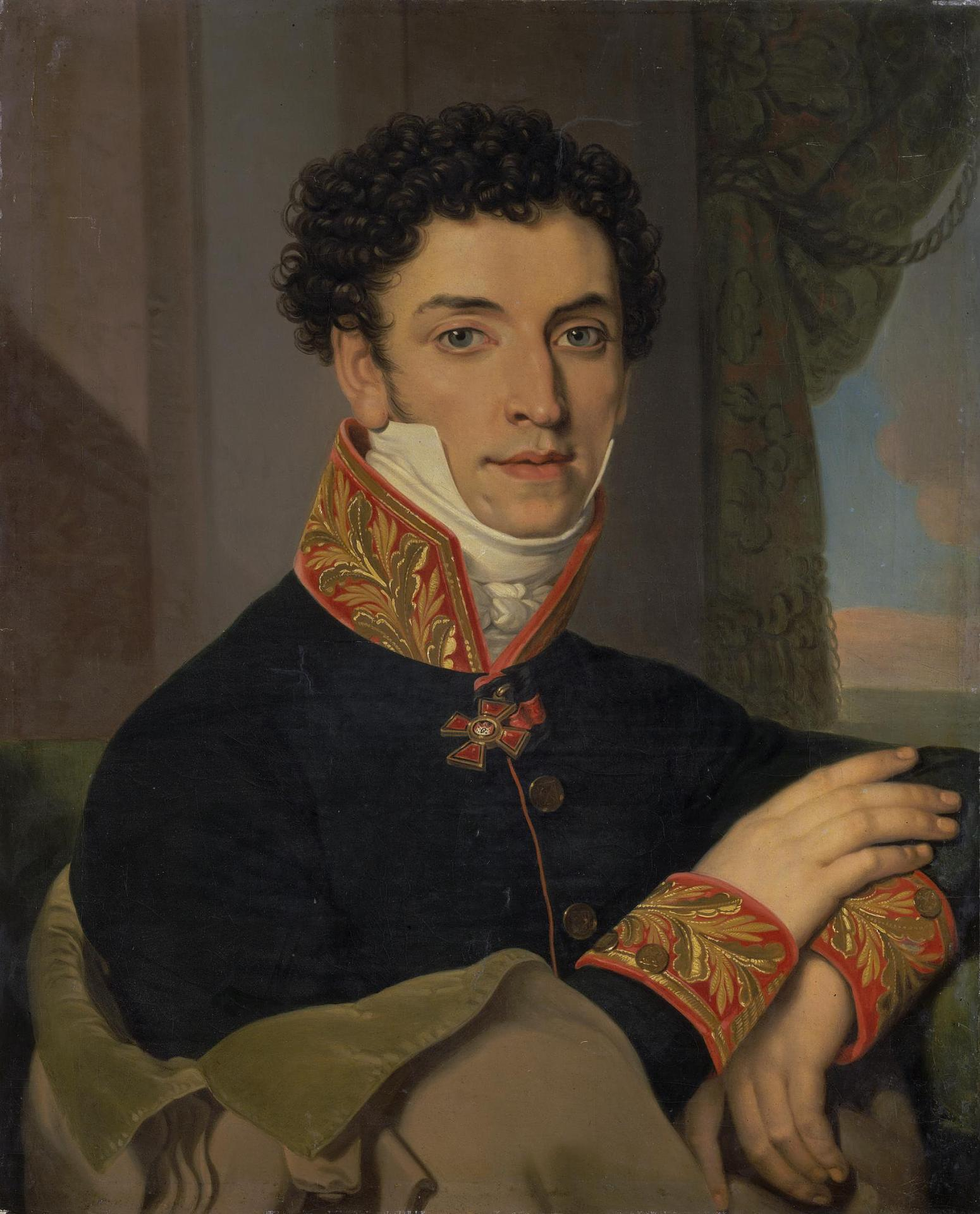 Николай Петрович Новосильцев (1789-1856)